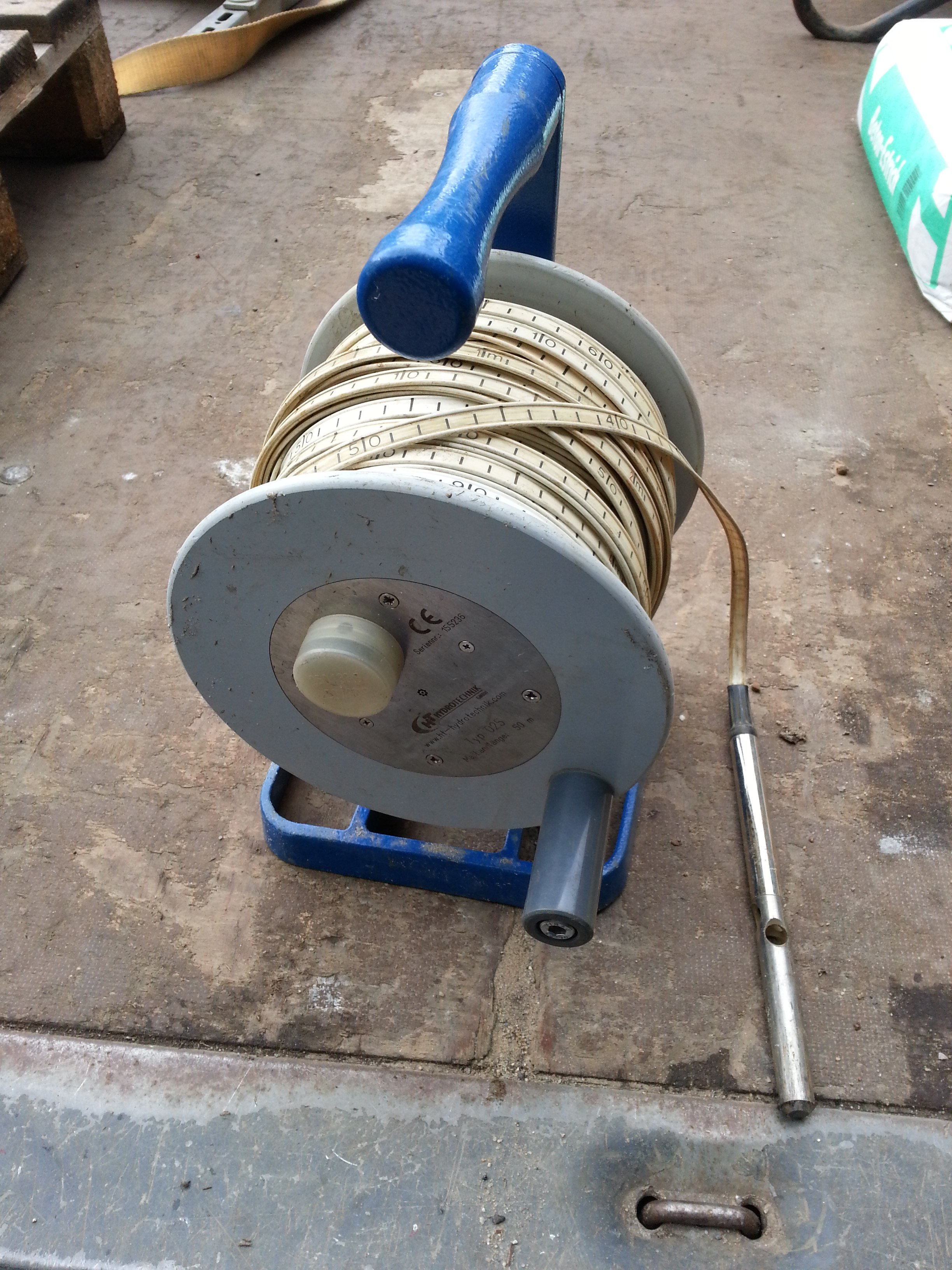 Bild eines modernen Kabellichtlotes welches im Brunnenbau zur Wasserspiegelermittlung genutzt wird. Bereitgestellt durch